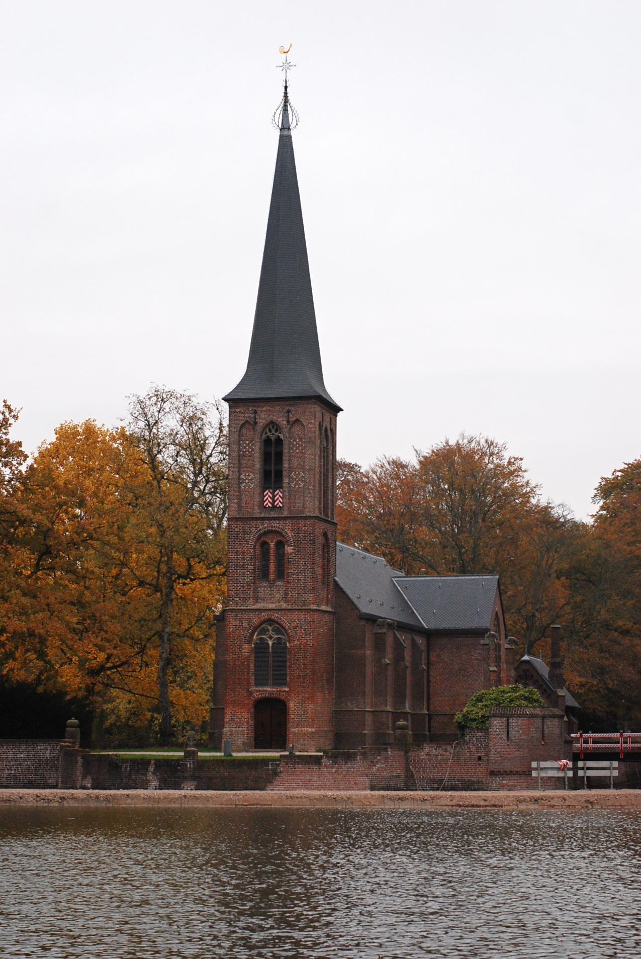 Kerk bij Kasteel de haar